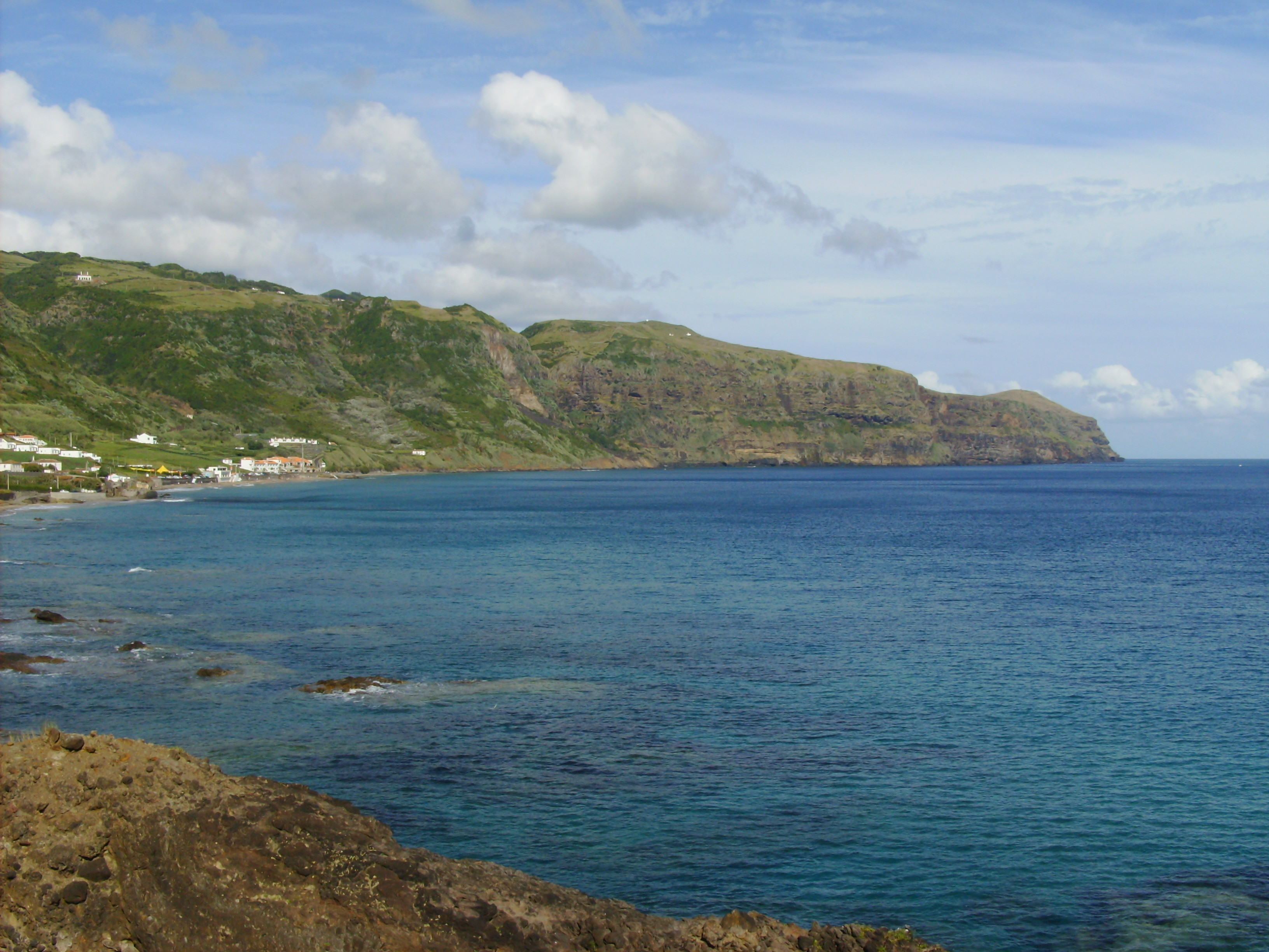 Baía da Praia Formosa, Ilha de Santa Maria (Açores), Portugal.